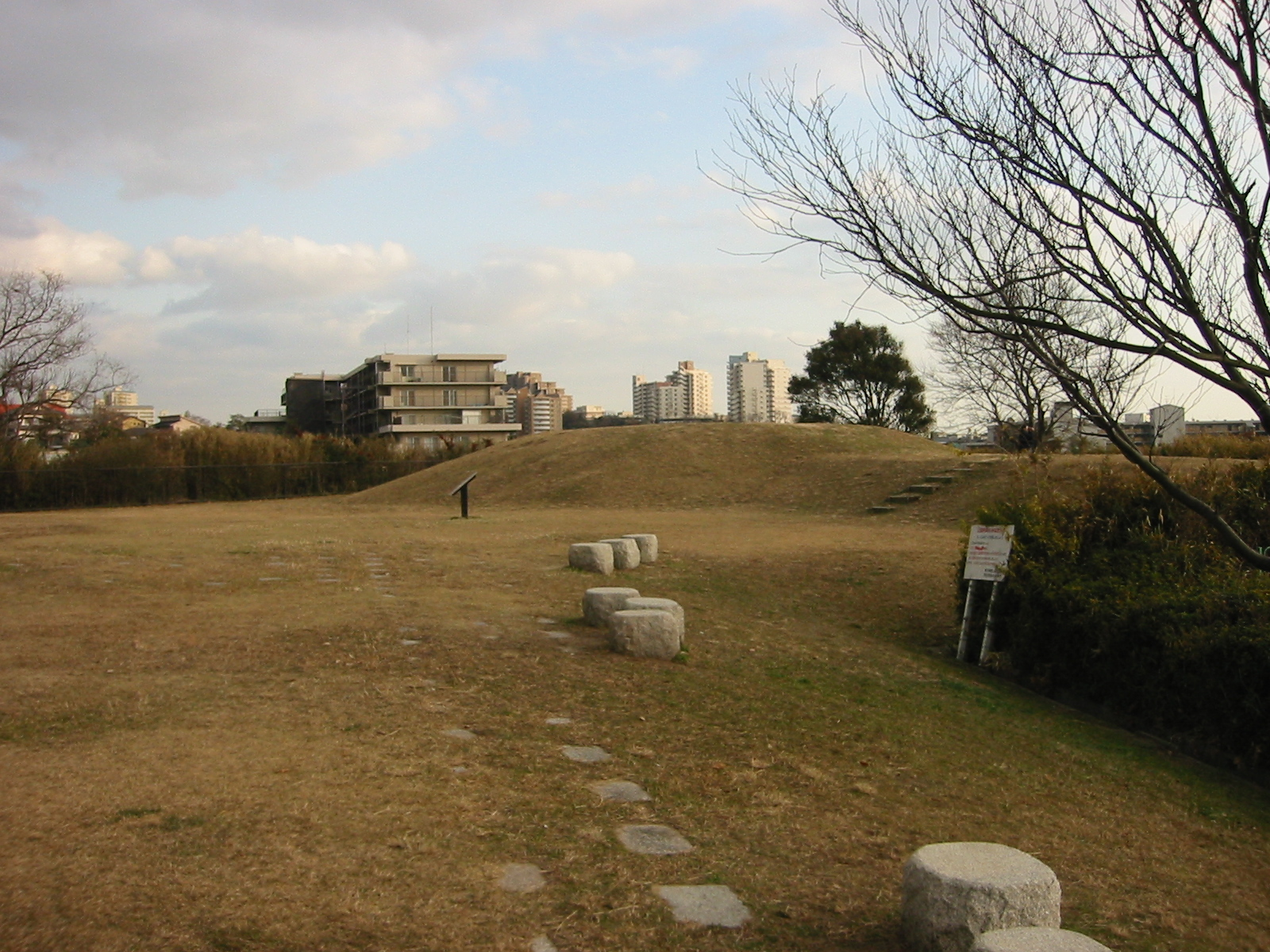 大歳山遺跡公園